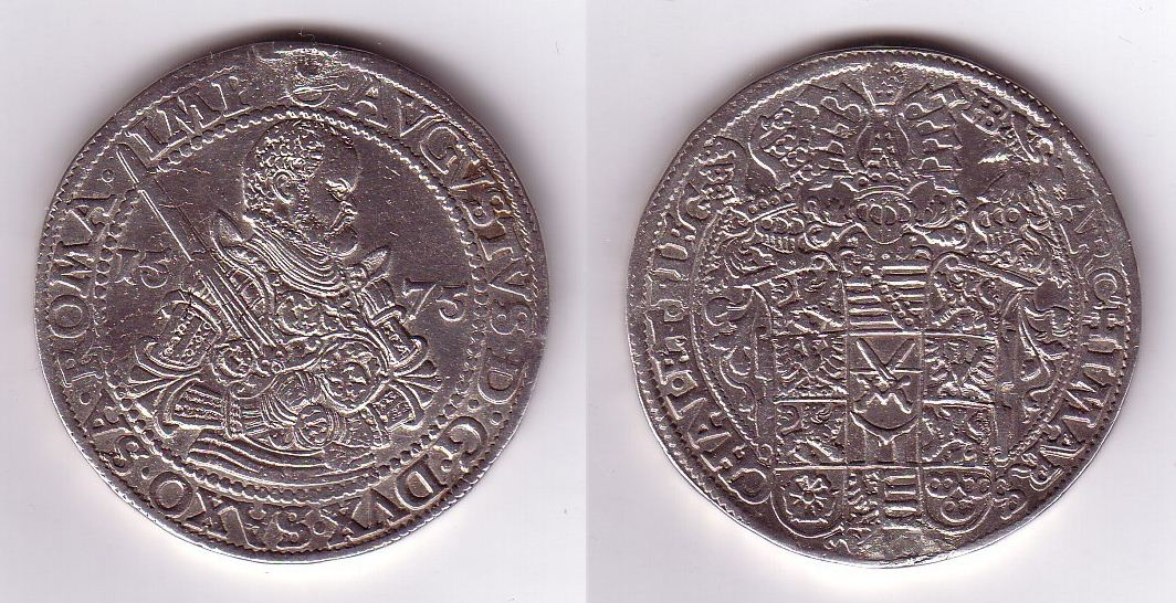 Kurfürstentum Sachsen, August, Kurfürst von Sachsen, Reichstaler 1575